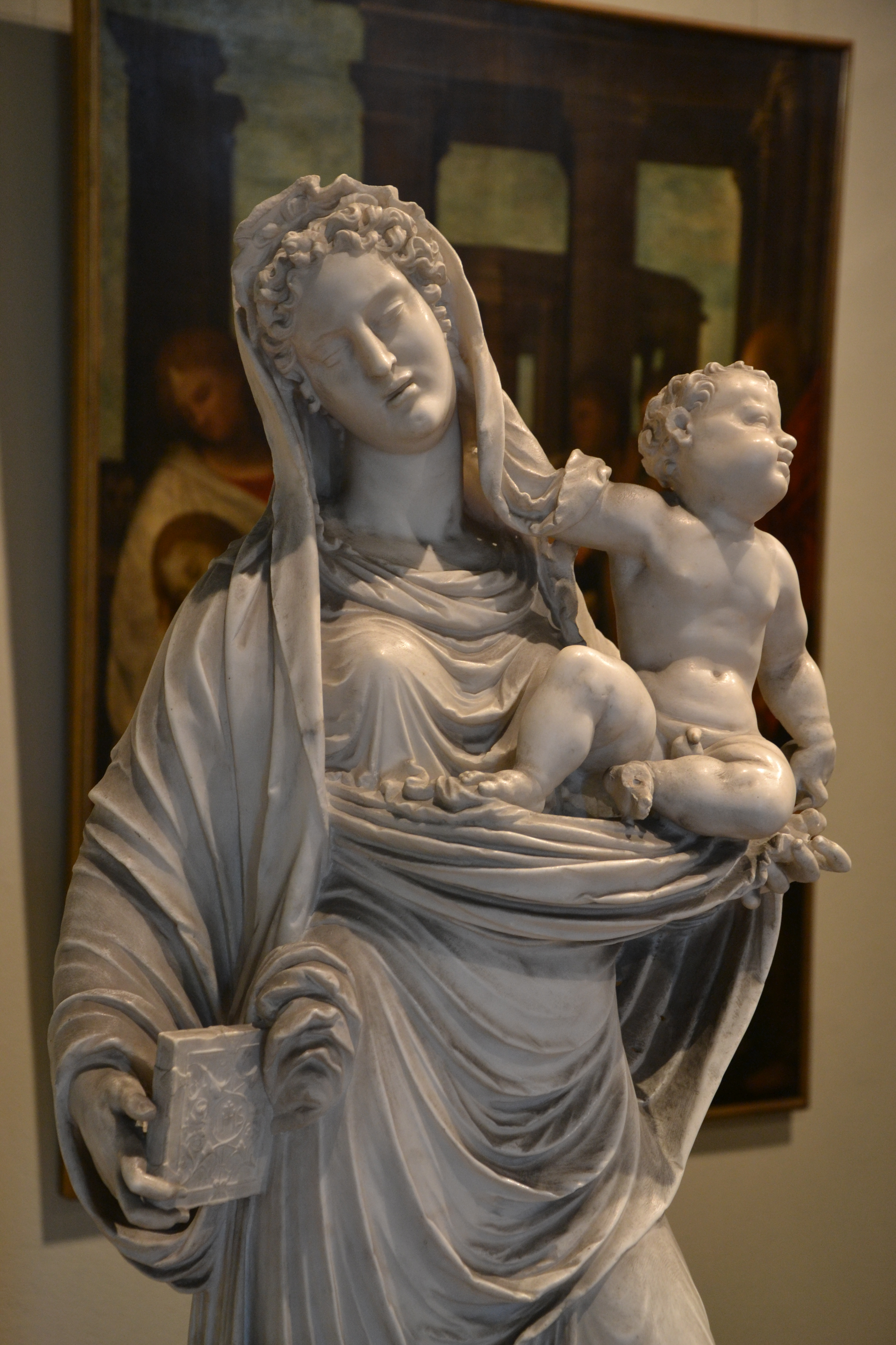 Castello sforzesco - Busti, Agostino il Bambaja - Madonna col bambino